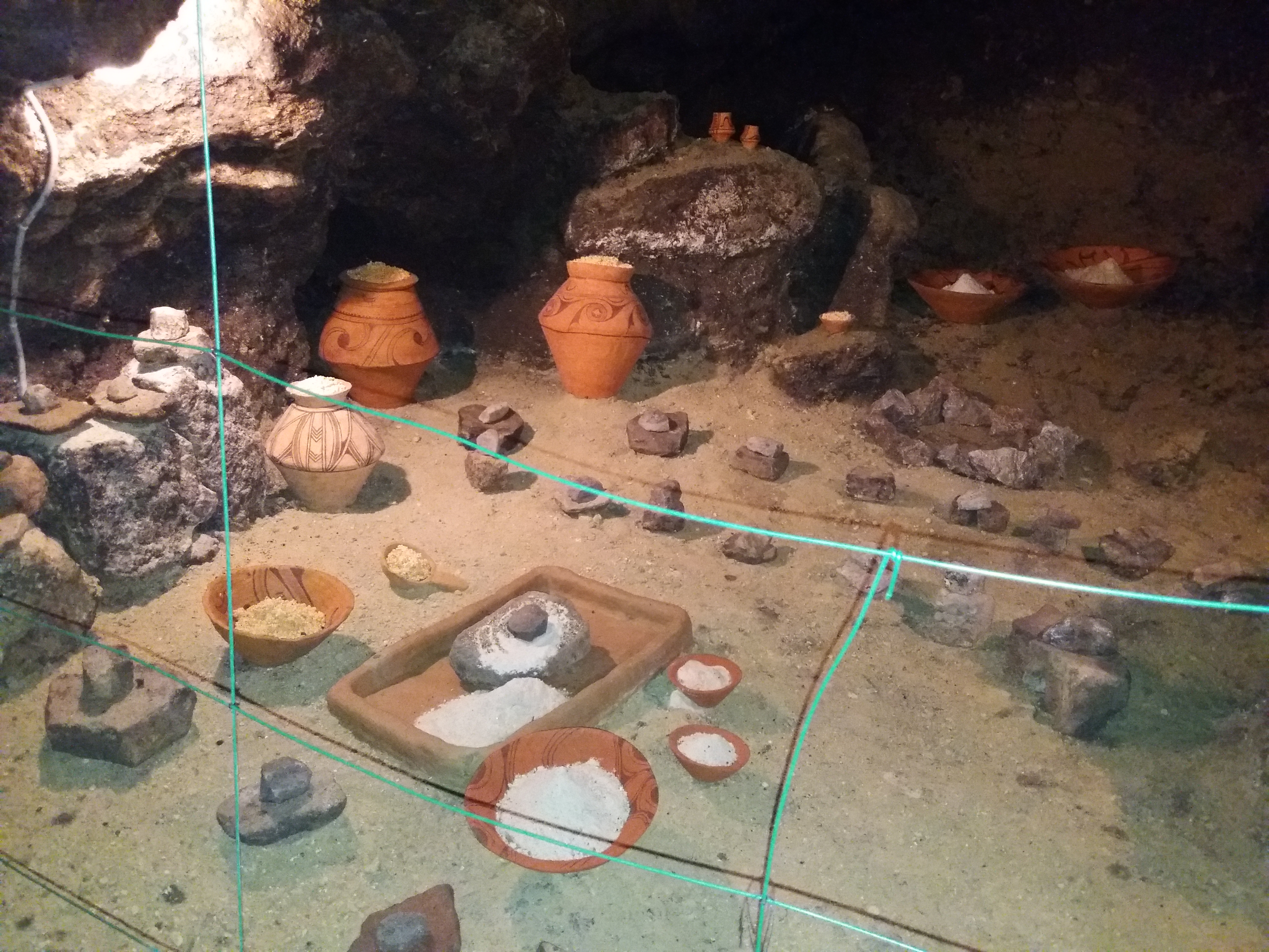 Печера «Вертеба», Борщівський район, с. Більче-Золоте, 2 км на пн.-зх. від села